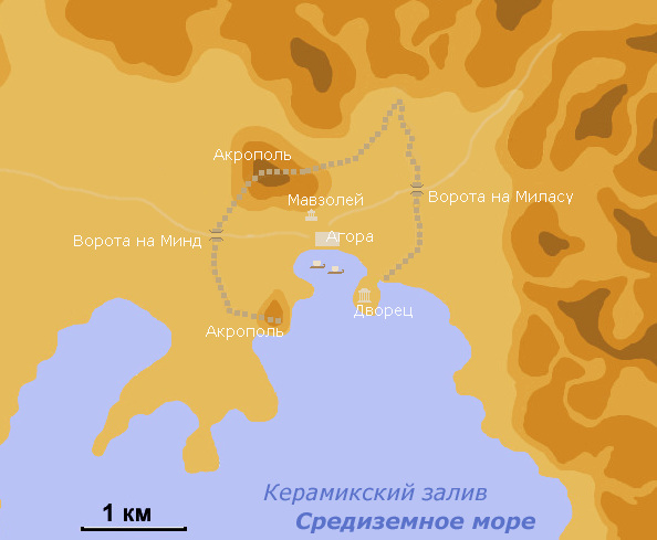 Схема античного Галикарнаса. Береговая линия выполнена по снимкам из космоса (была другая в античность), линия стен восстановлена примерно по сохранившимся руинам.